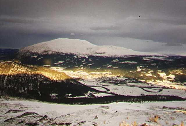 Tron el. Tronfjellet sett fra sørvest med Alvdal tettsted i forgrunnen